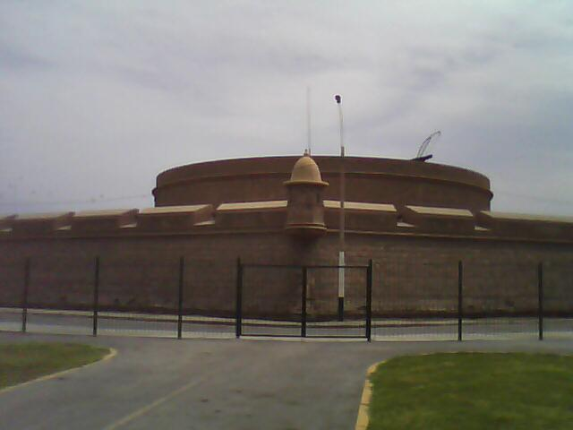 Vista exterior del Torreón de la Reina.